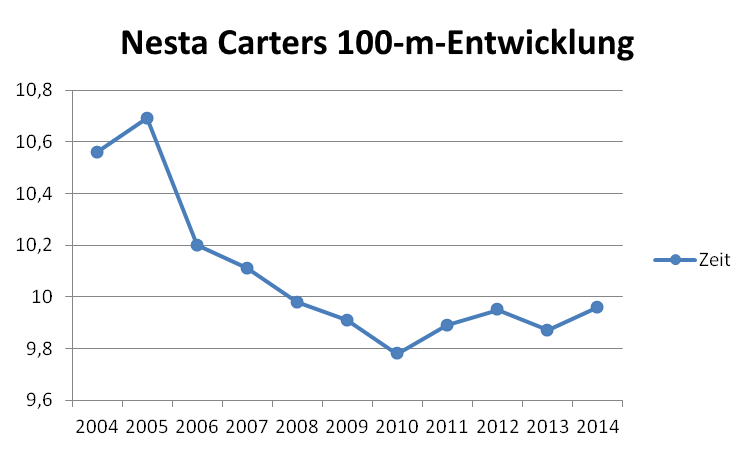 Enticklung der Saisonbestleistung von Nesta Carter über 100 Meter